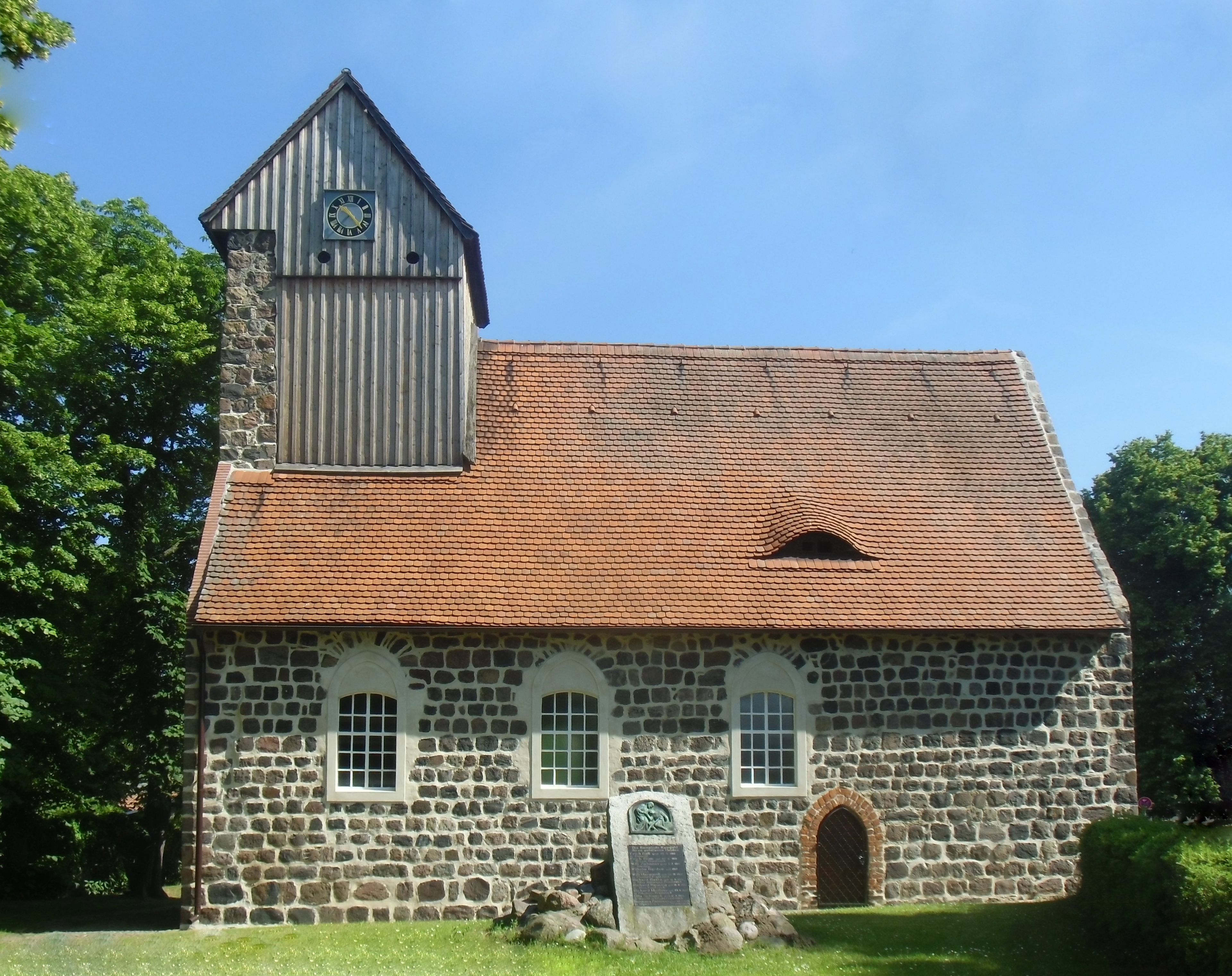 Denkmalgeschützte evangelische Dorfkirche in Kampehl, Ortsteil von Neustadt (Dosse), aus dem 13. Jahrhundert mit der Gruft des Ritters Kahlbutz